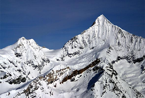 Weisshorn (4505 m), links das Schalihorn (3978 m)